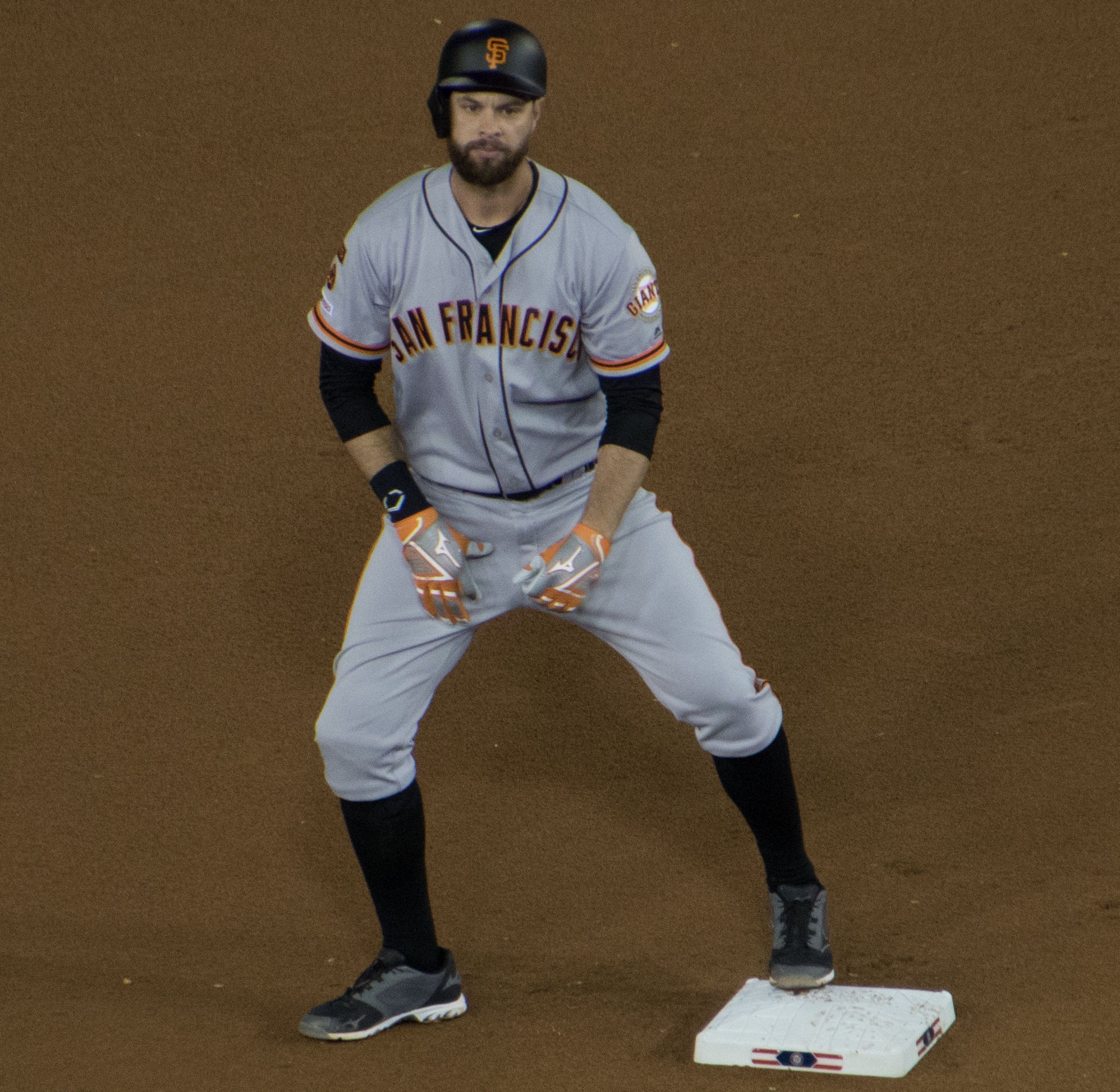 Brandon Belt